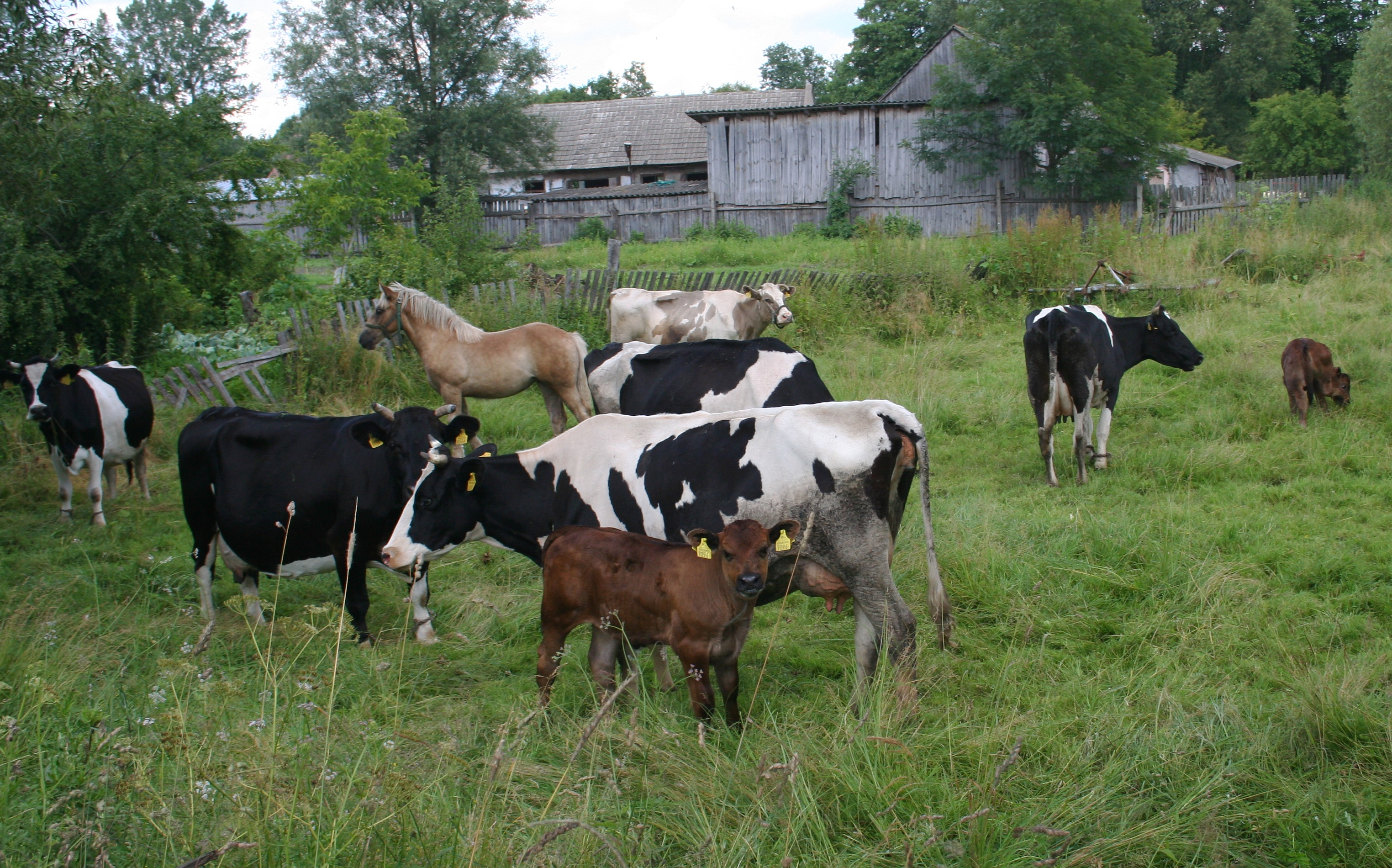 Pastwisko w miejscowości Gorędy, gmina Narew, woj. podlaskie